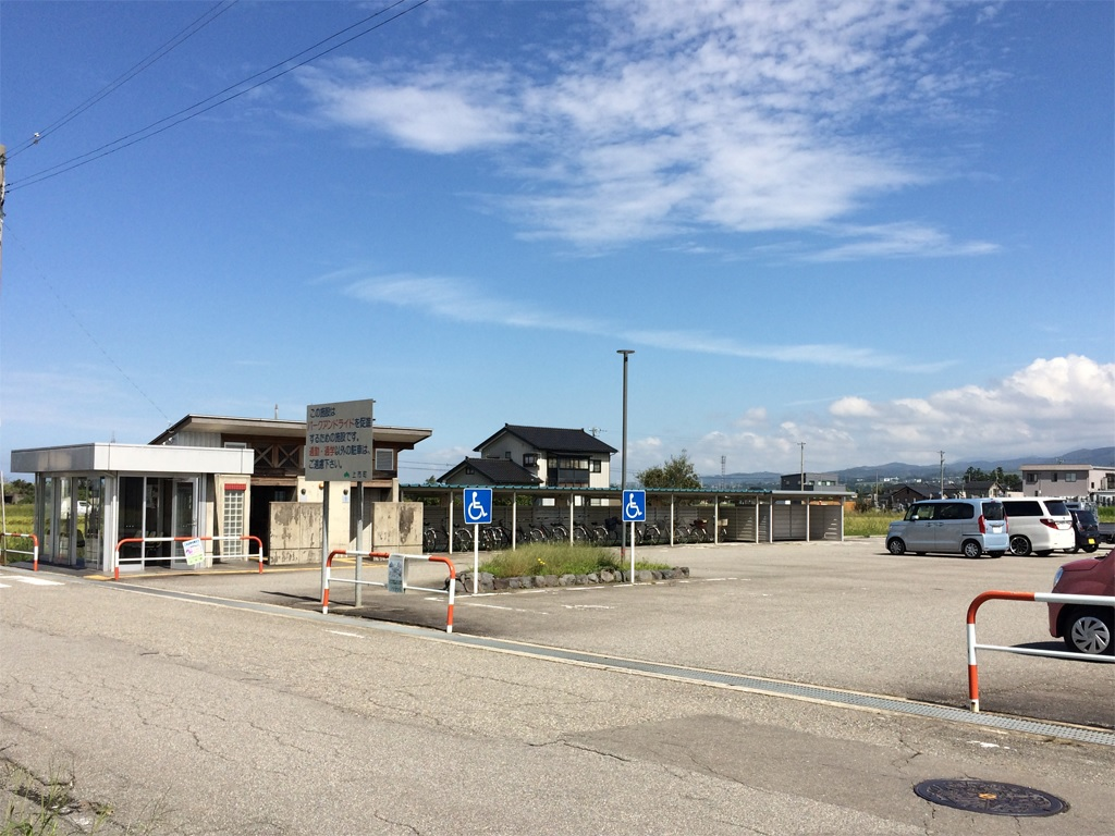 富山地方鉄道本線新宮川駅駐車場